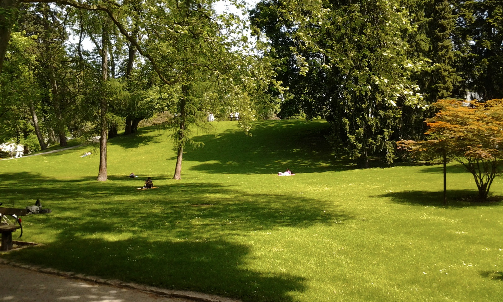 Der Rosenhügel im Salzburger Kurpark (Stadtteil Neustadt), Rest einer Wehrbastei.